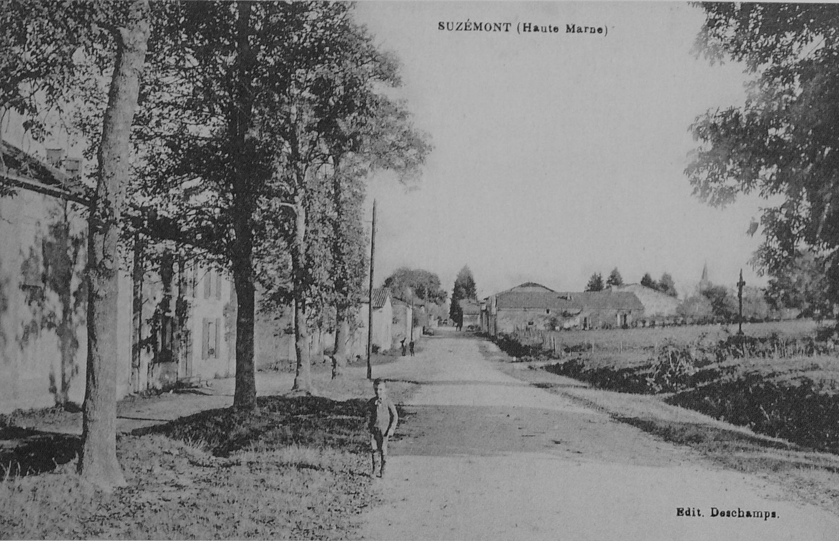 sur une carte postale ancienne.